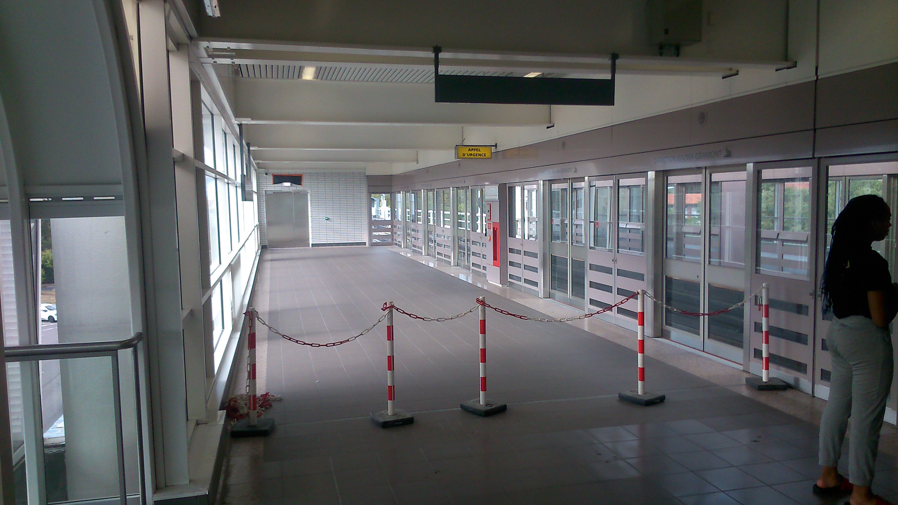 La station Basso Cambo de la ligne A du métro de Toulouse après l'extension à 52m